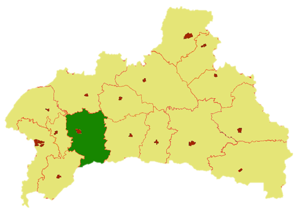 Kobrynský rajón v rámci Brestské oblasti